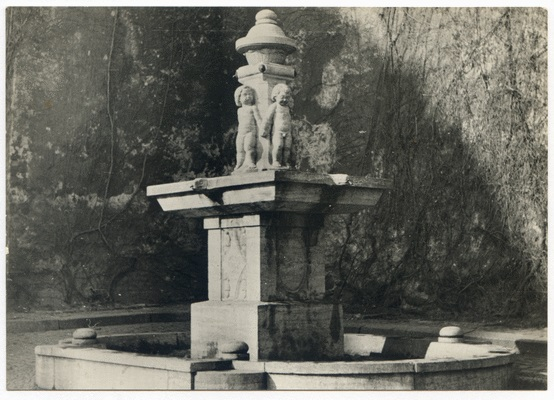 Königsberg, Puttenbrunnen